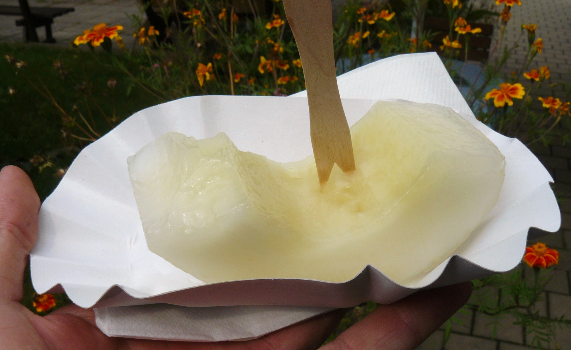 Ogórek spreewaldzki (tutaj w odmianie Senfgurken).